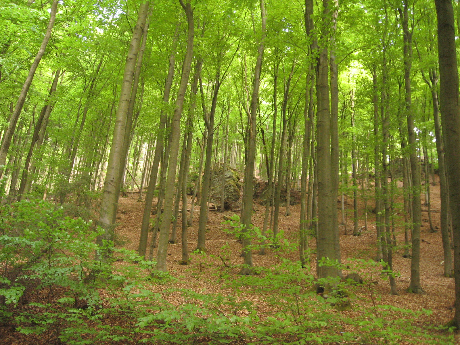 Felsen im westlichsten Bereich des Naturdenkmal Felsgruppen Overlackersberg